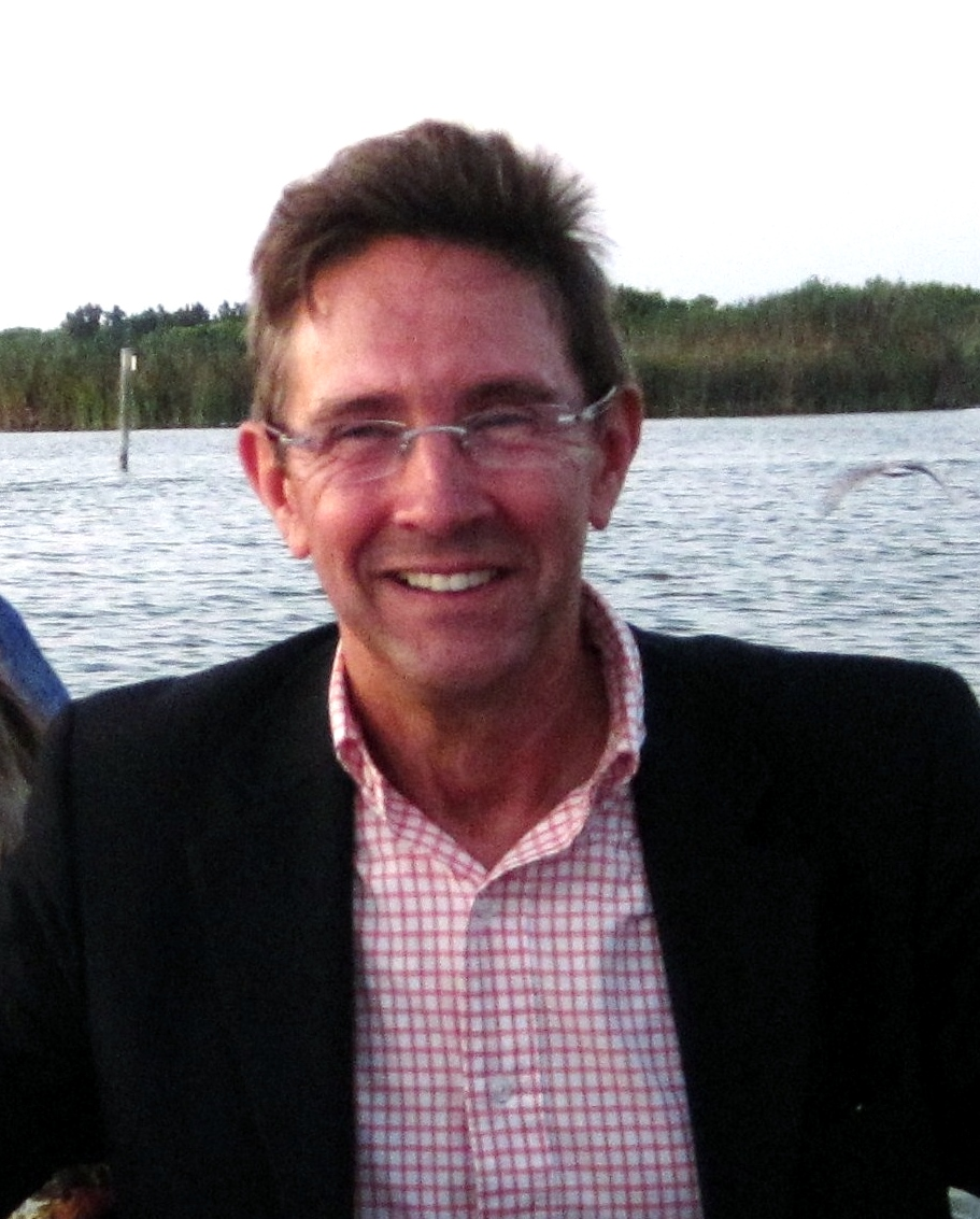 Ricard Bellveser en la Albufera de Valencia, 2011